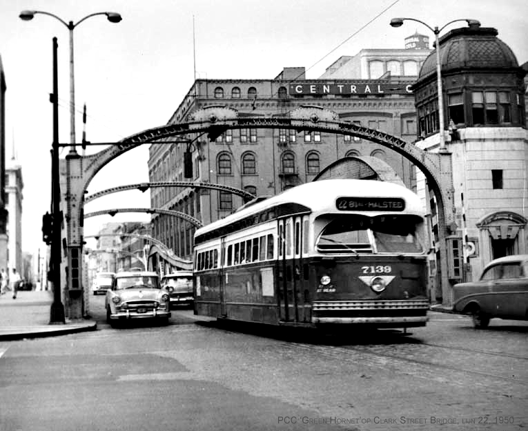 Deze opname is uit 1950 en door mijzelf gemaakt vanaf de hoek Clark Street Wacker Drive.